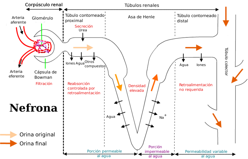 Interwiki